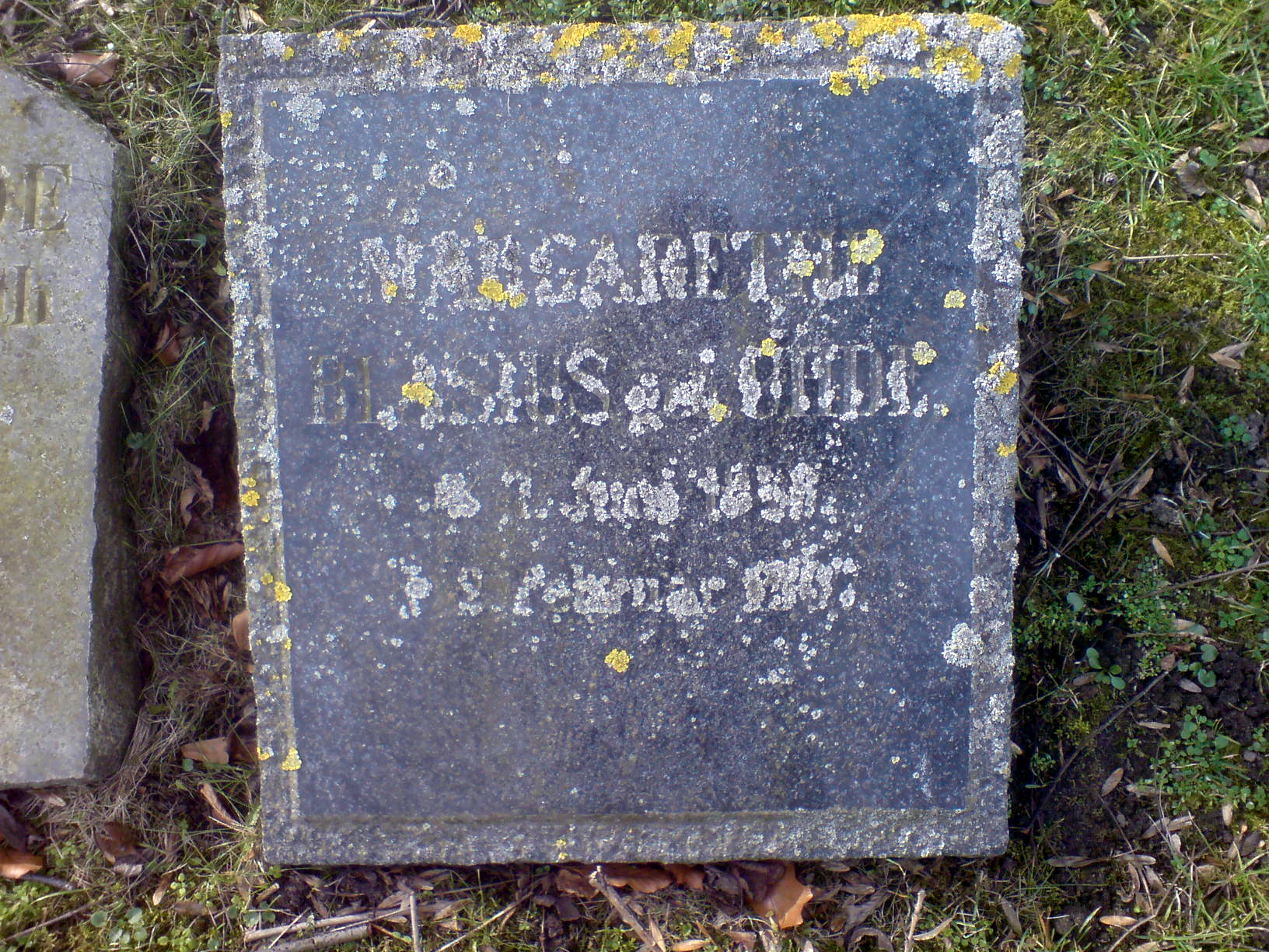 Grabinschrift: "Margarethe Blasius, geb. Uhde * 1. Juni 1858, + 2. Februar 1907". Foto aufgenommen auf dem Friedhof der Reformierten Gemeinde (Braunschweig, Juliusstrasse).